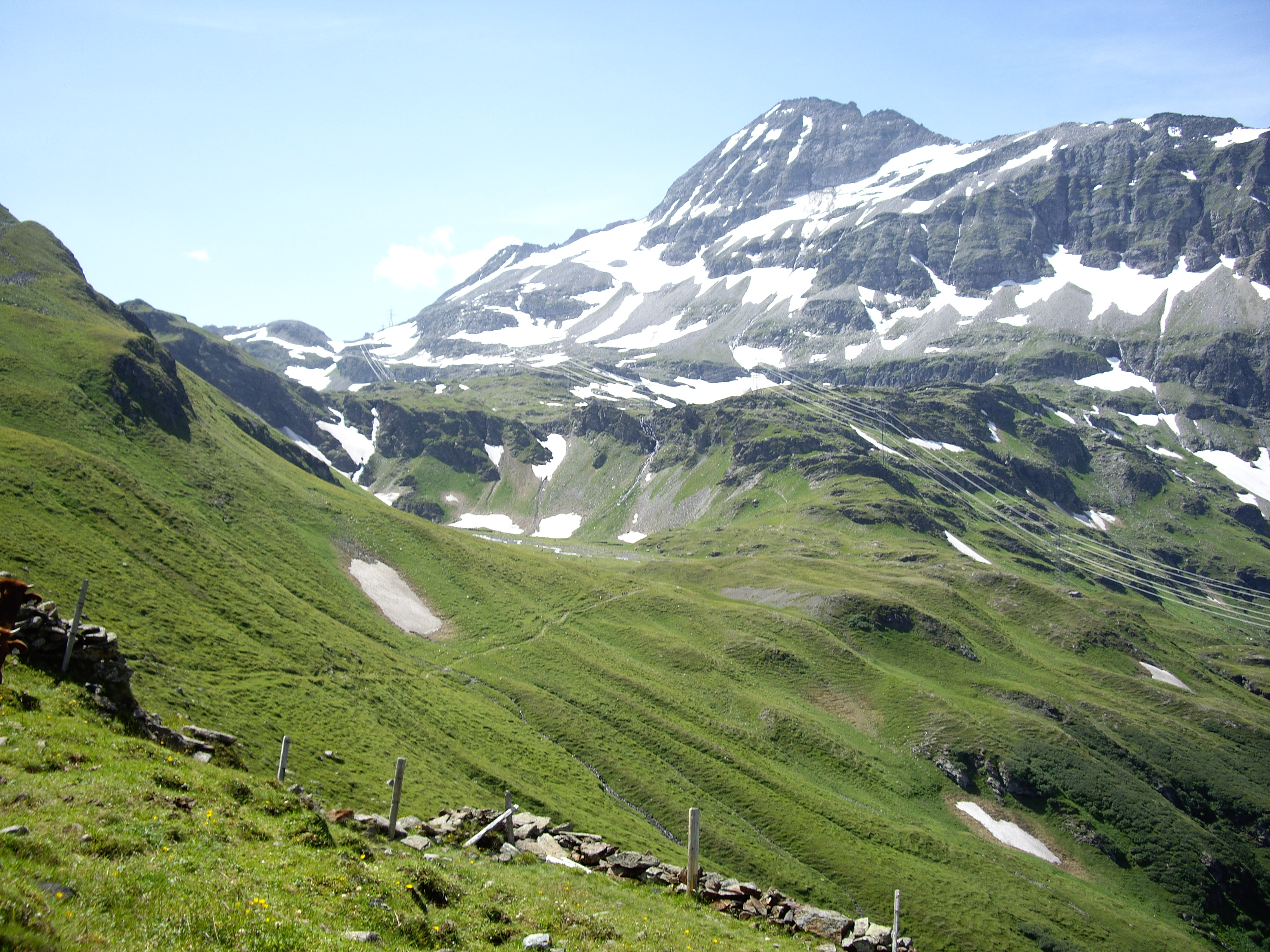 Felber Tauern von Norden her gesehen. Rechts der Tauernkogel, 2988